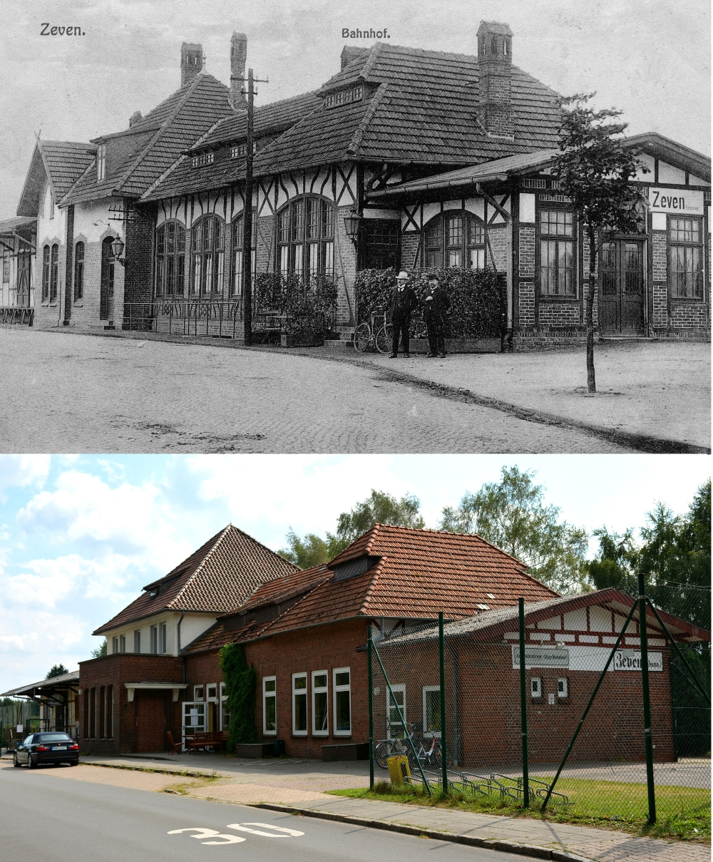 Bahnhof Zeven